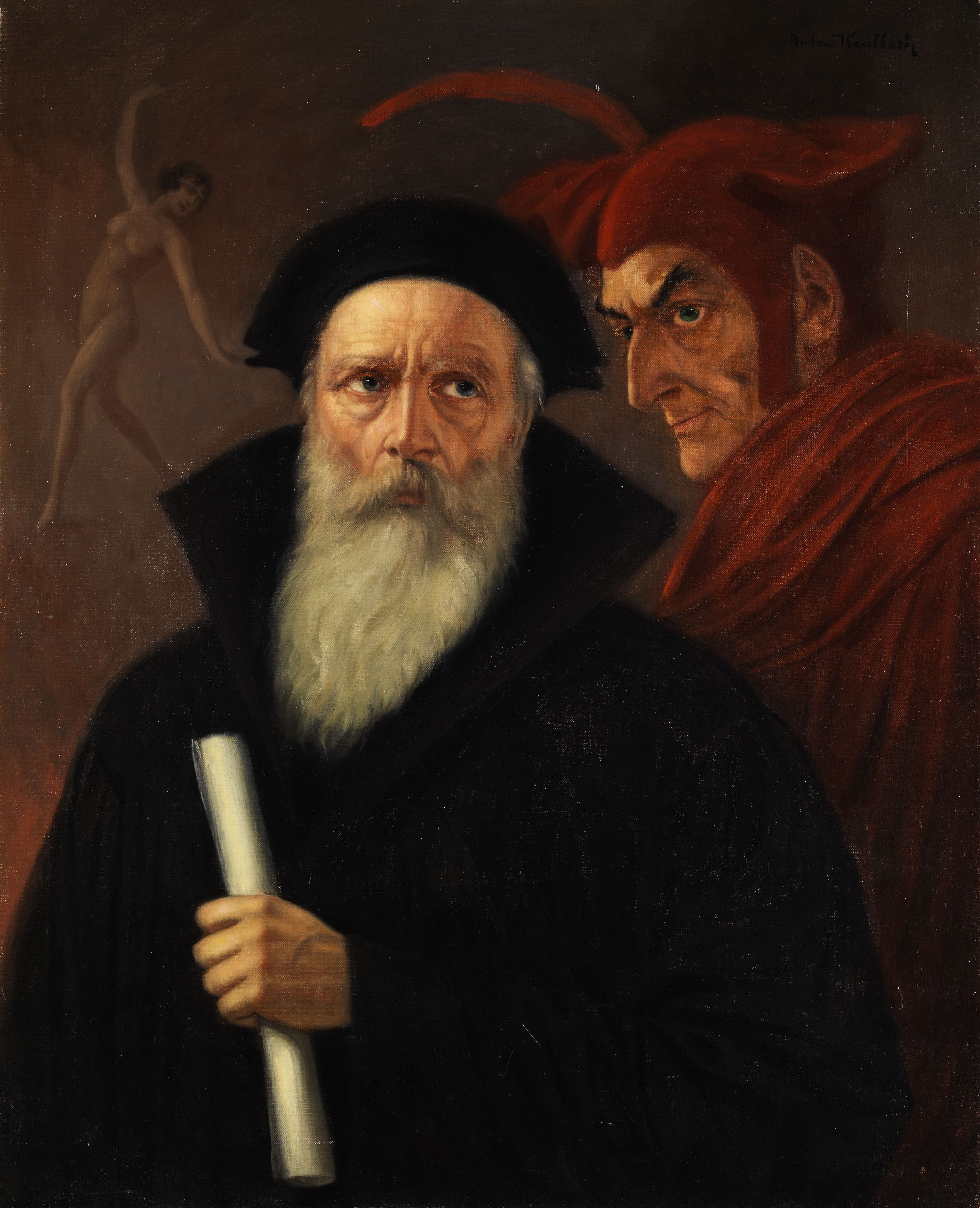 Faust und Mephisto. Öl auf Leinwand. 80 x 65 cm. Rechts oben signiert.